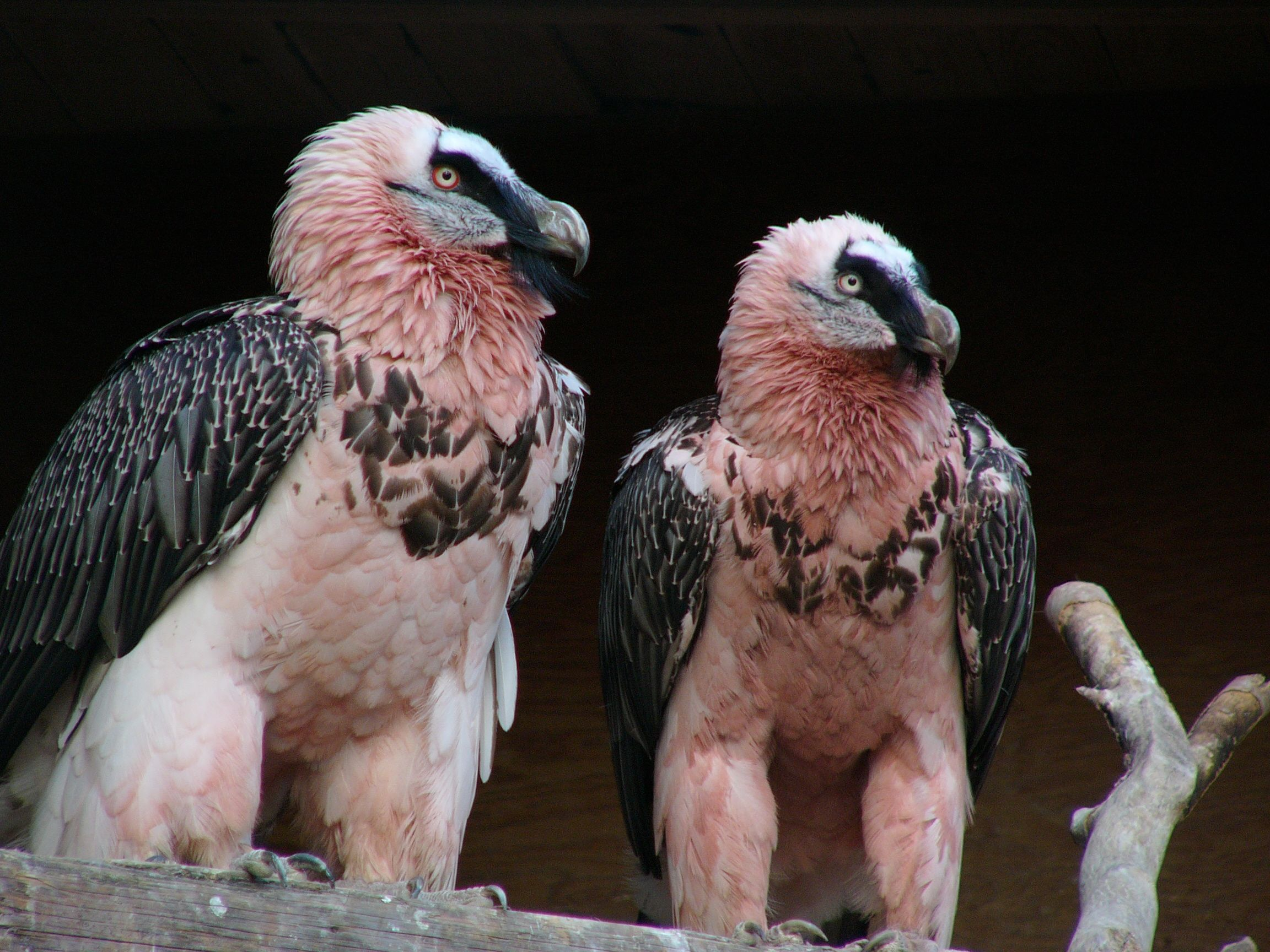 couple de gypaète barbu.Aragonés: Parella de trencauesos.